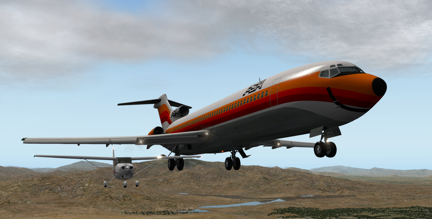 PSA182の衝突時の想像図（X-Planeで作成）